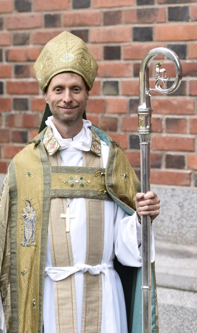 Mikael Mogren vigs till ny biskop för Västerås stift.